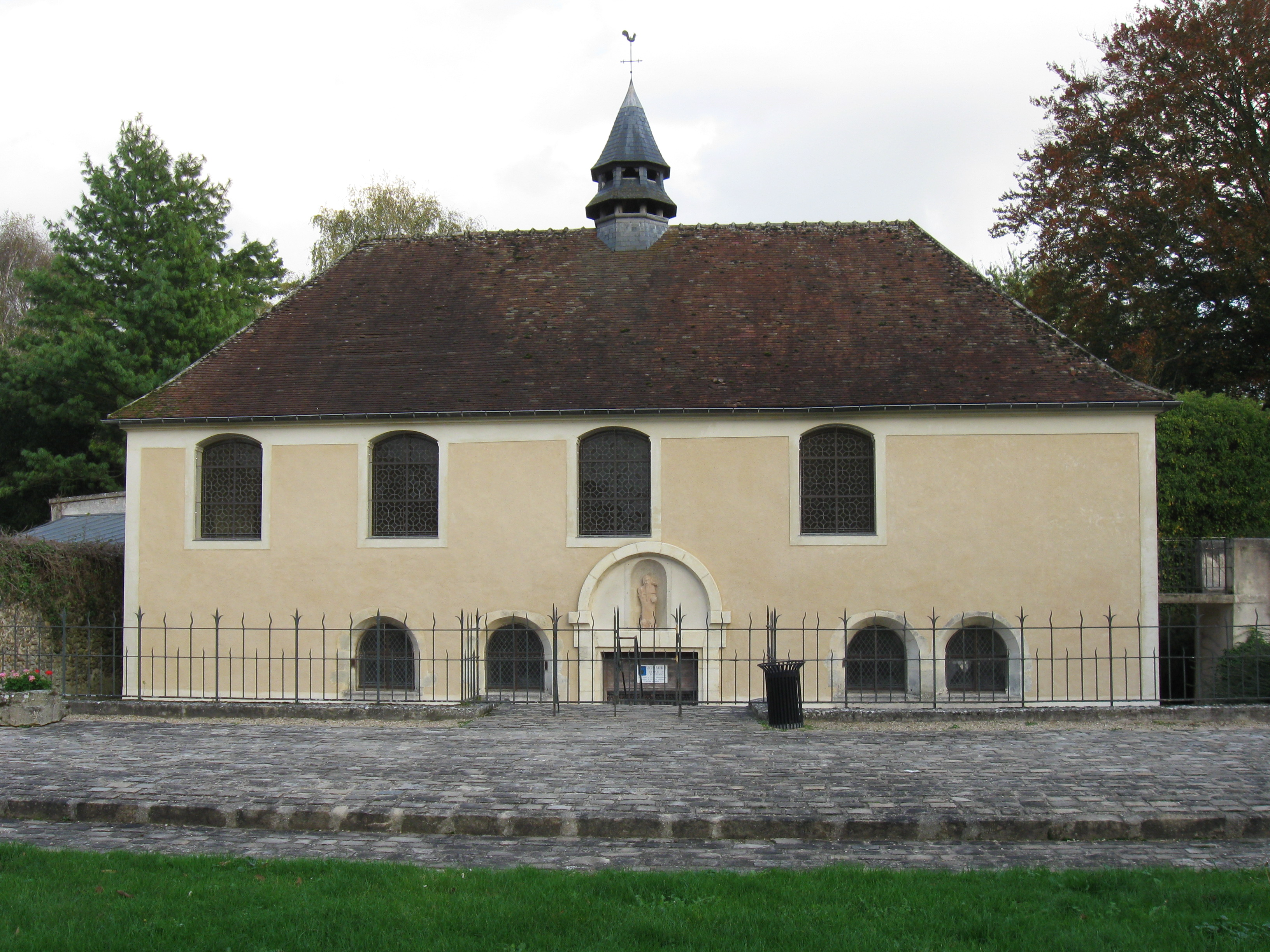 Cryptes de Jouarre. (Seine-et-Marne, région Île-de-France).